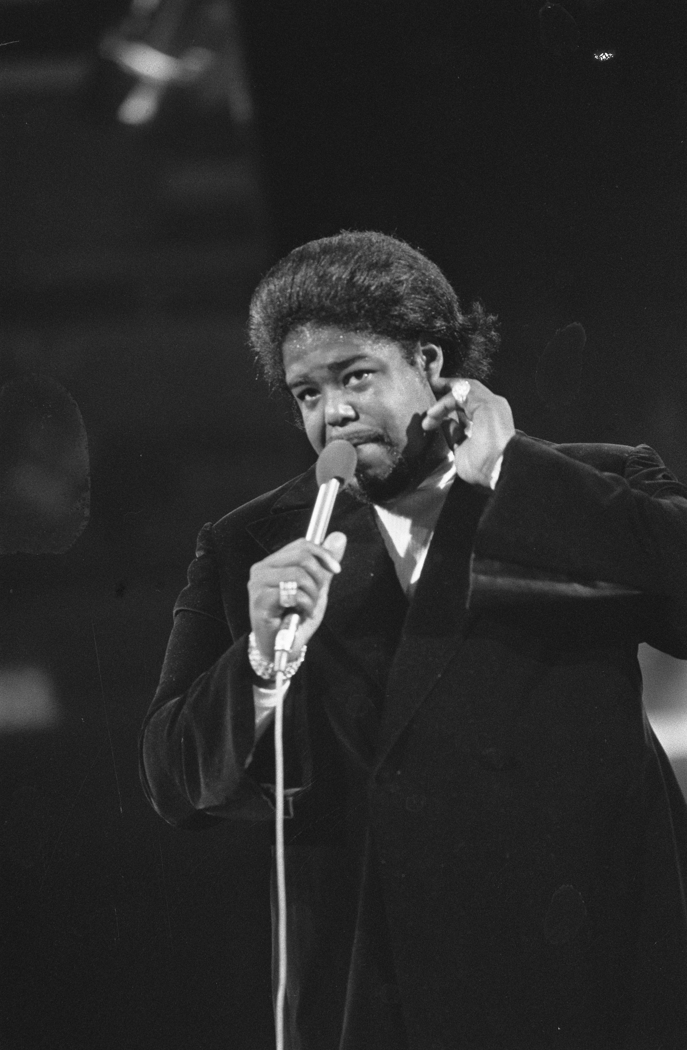 Collectie / Archief : Fotocollectie Anefo Reportage / Serie : Grand Gala du Disque in de RAI Beschrijving : Barry White Datum : 17 februari 1974 Locatie : Amsterdam, Noord-Holland Trefwoorden : festivals, zangers Persoonsnaam : White, Barry Instellingsnaam : RAI Fotograaf : Fotograaf Onbekend / Anefo Auteursrechthebbende : Nationaal Archief Materiaalsoort : Negatief (zwart/wit) Nummer archiefinventaris : bekijk toegang 2.24.01.05 Bestanddeelnummer : 927-0099